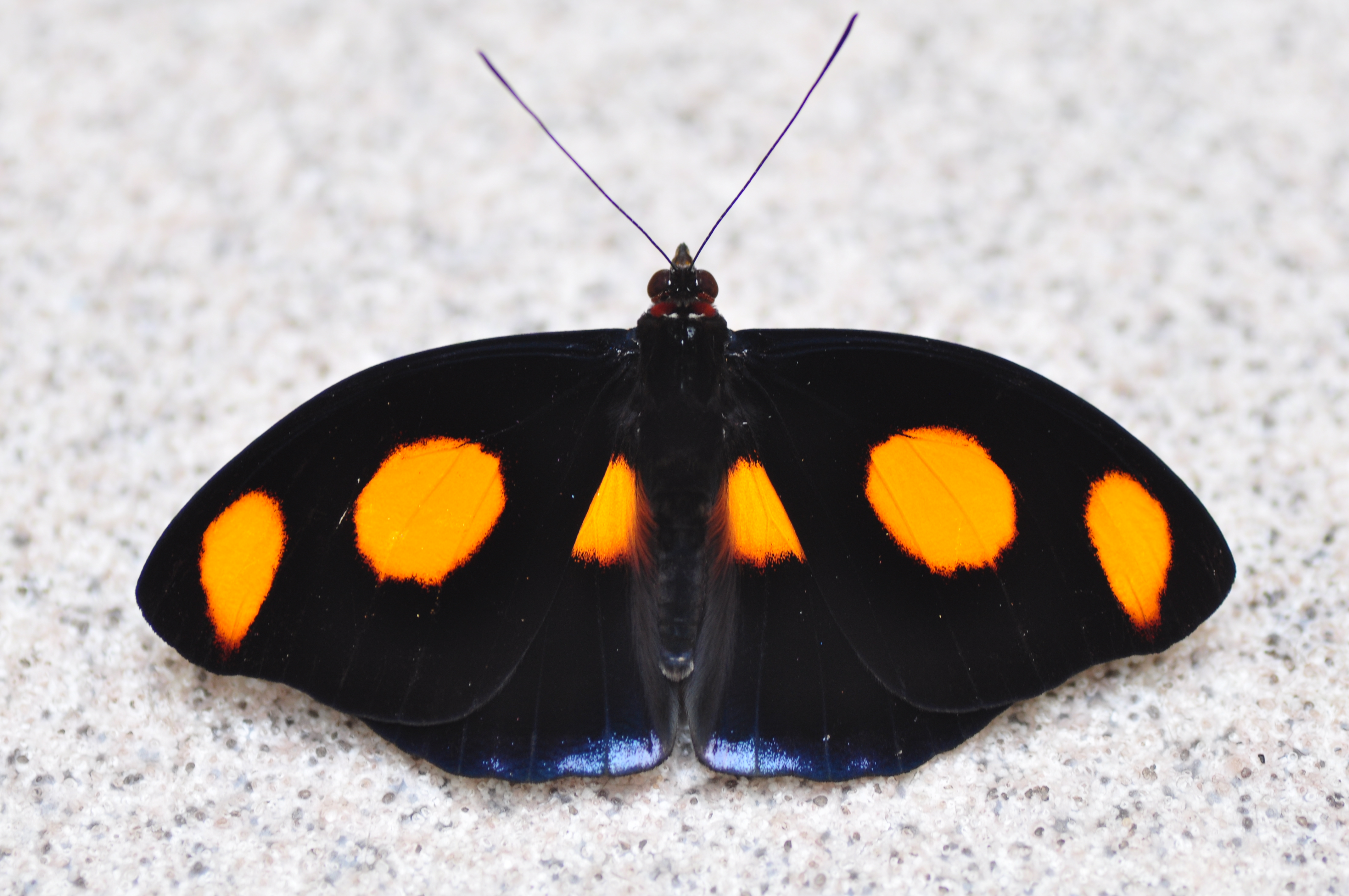 From Zoologico de Chapultepec, Mexico